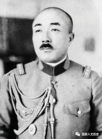 関東軍高級参謀時代の板垣。